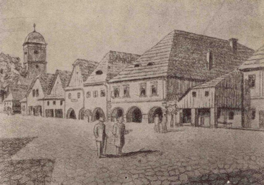 Námestie s kostolom v minulosti